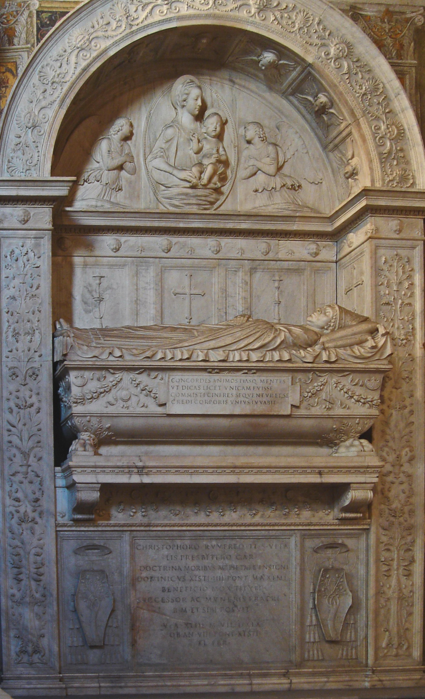 Grabmonument für Kardinal Cristoforo della Rovere; Santa Maria del Popolo, Rom